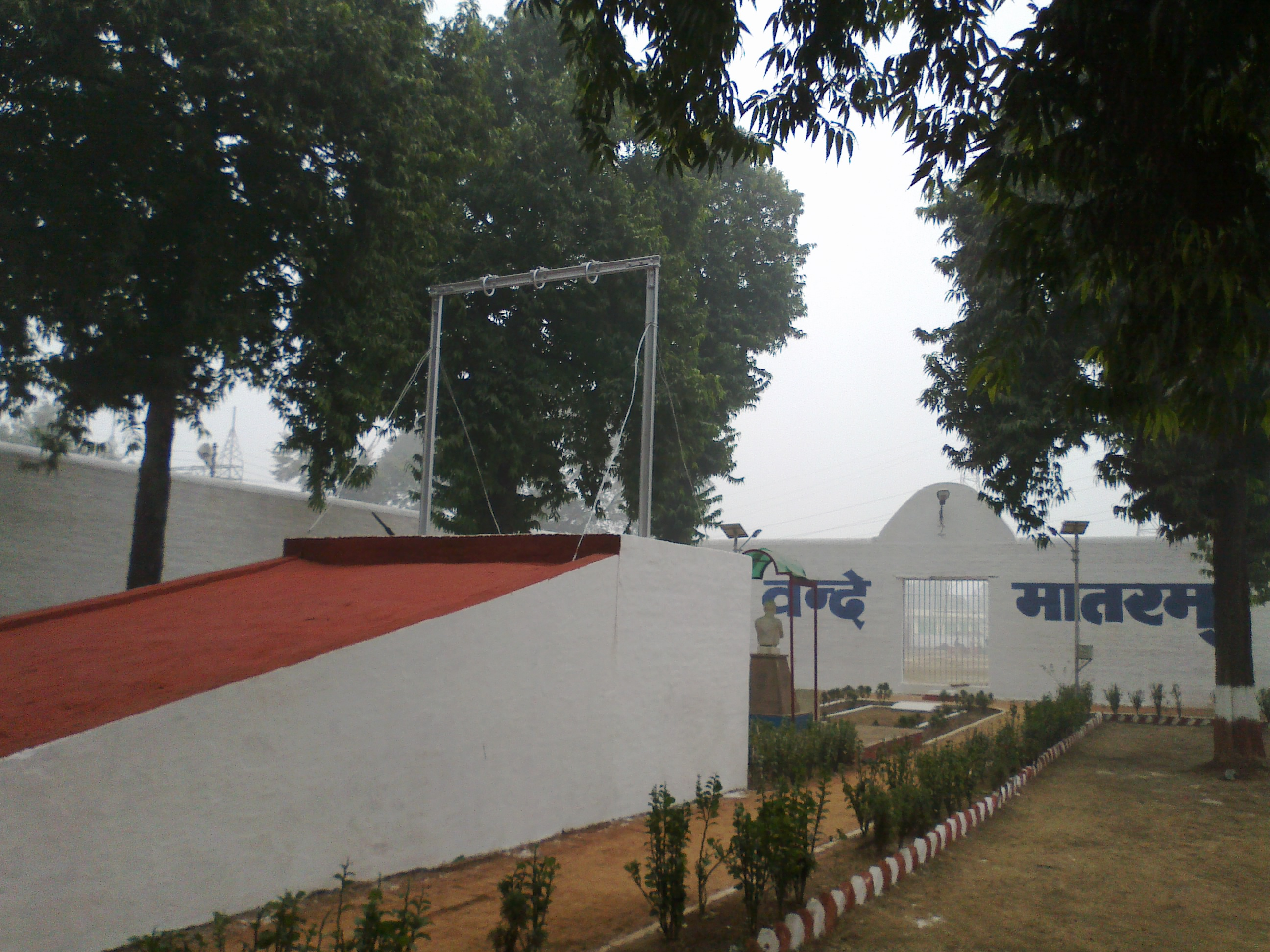 उत्तर प्रदेश के गोण्डा जिला कारागार स्थित फाँसीगृह में फाँसी का तख़्ता जिस पर राजेन्द्रनाथ लाहिड़ी ने शहादत दी थी।